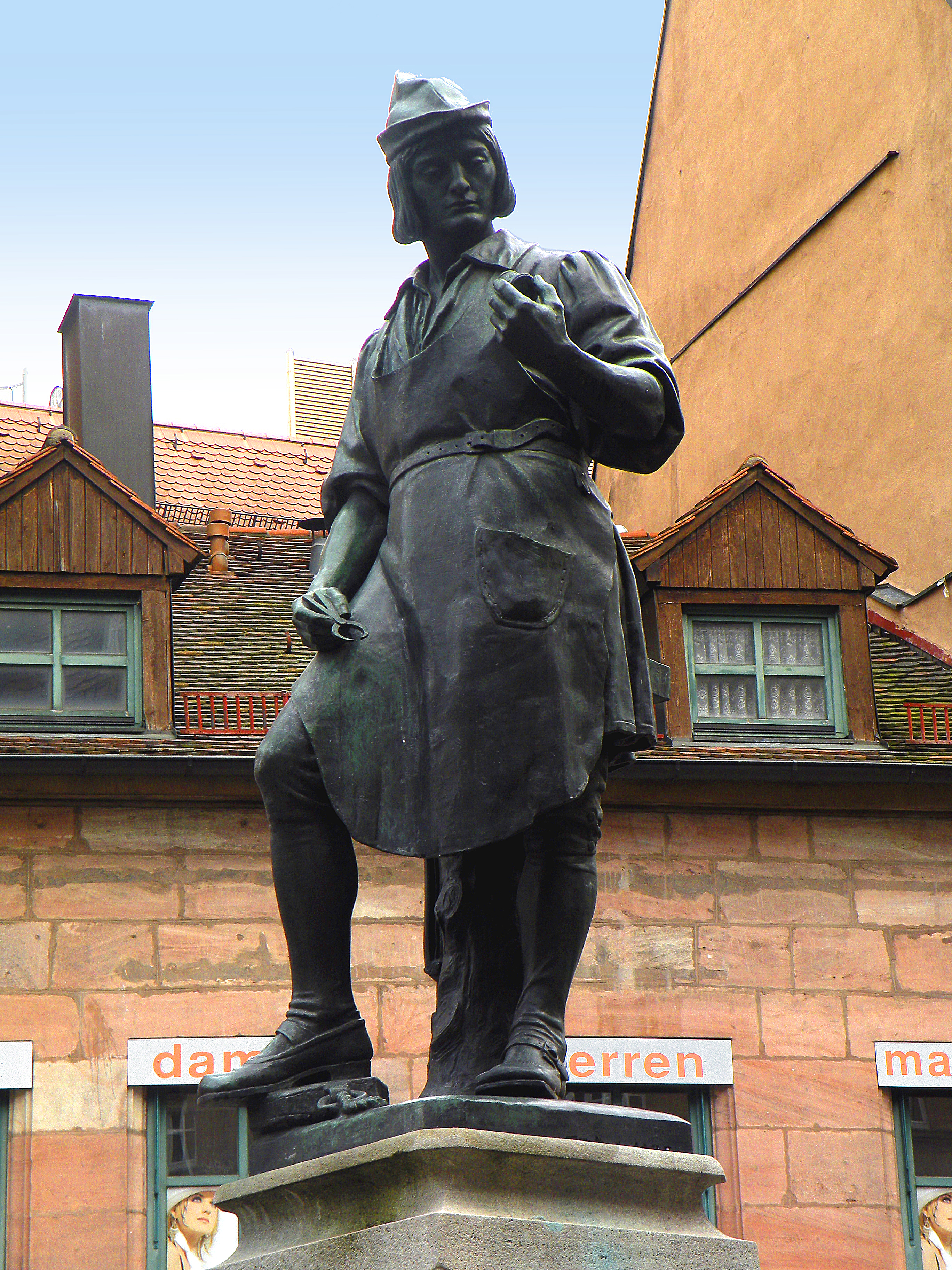 Monument Peter Henlein. Nuremberg by Max Meißner